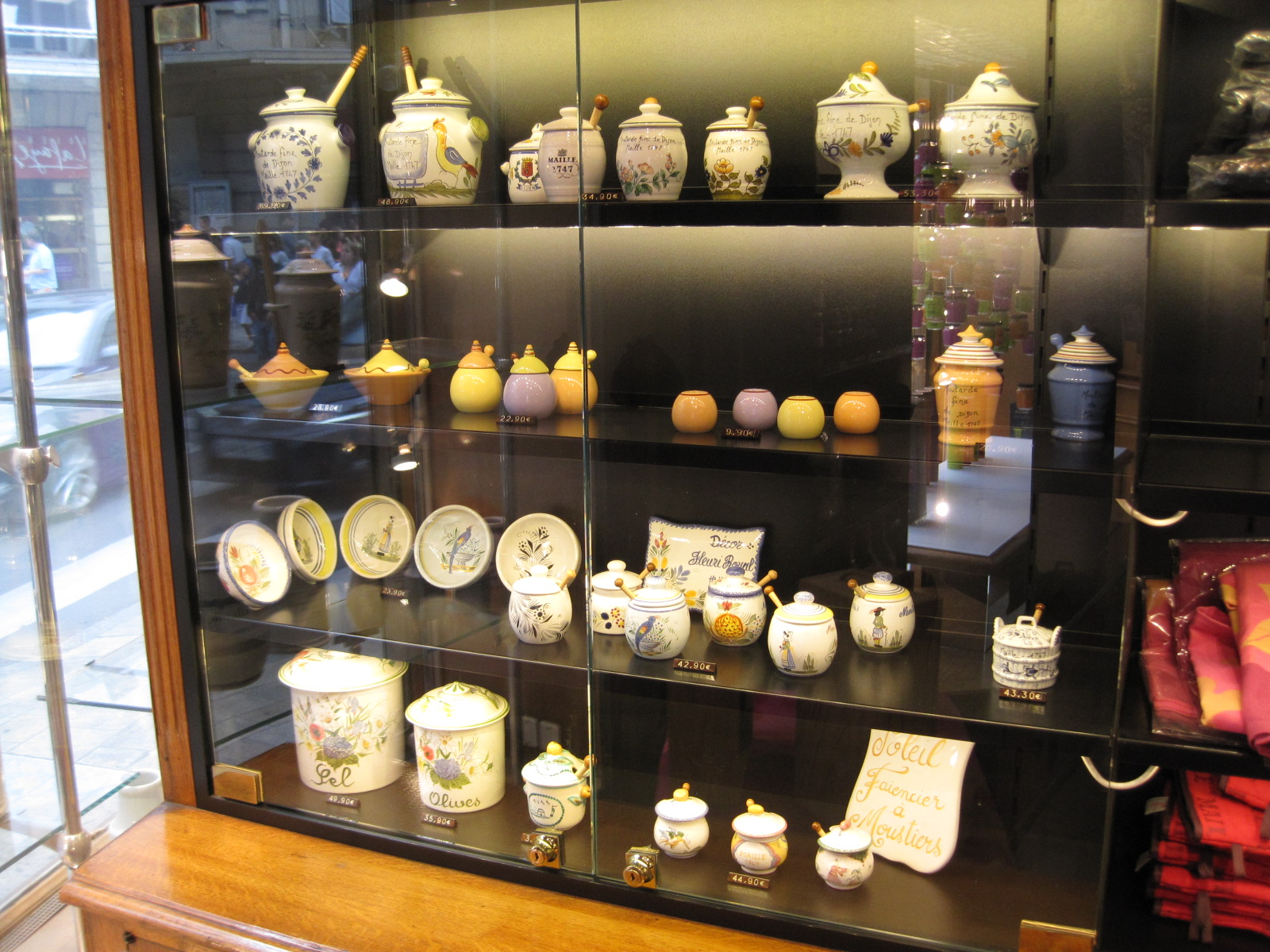 Dijon mustard